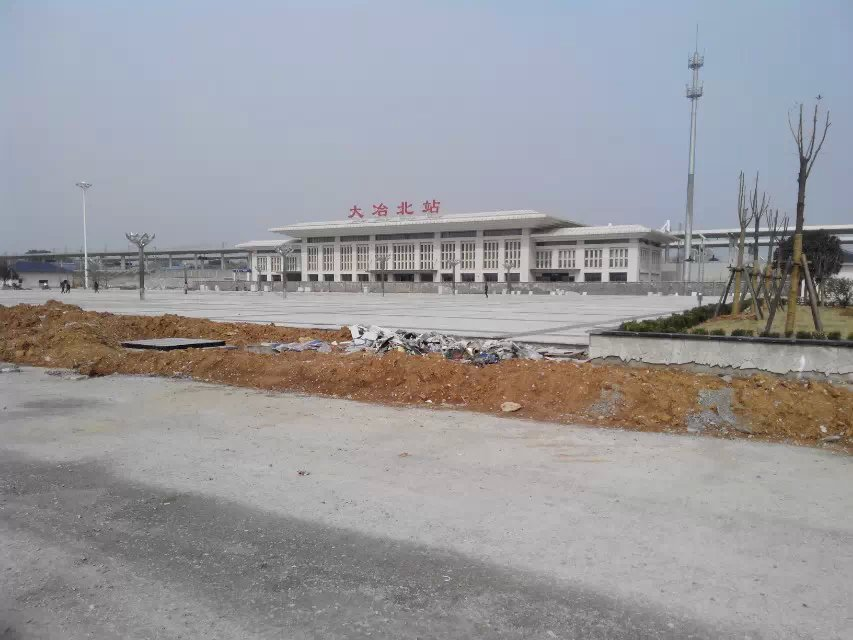 大冶北站 火车站